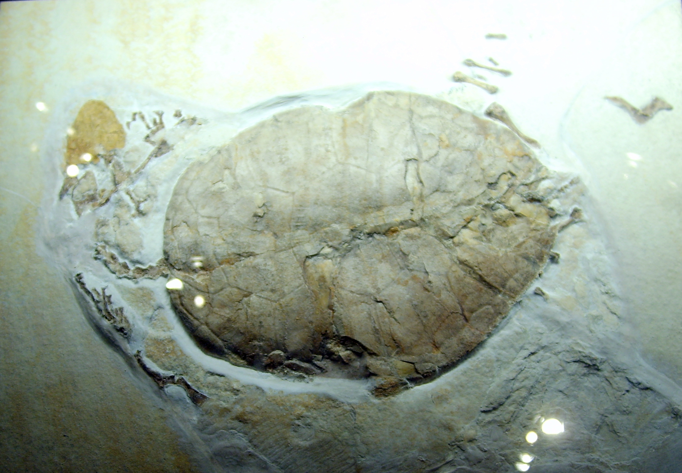 Palaeomedusa testa fossil at the Museum für Naturkunde, Berlin.